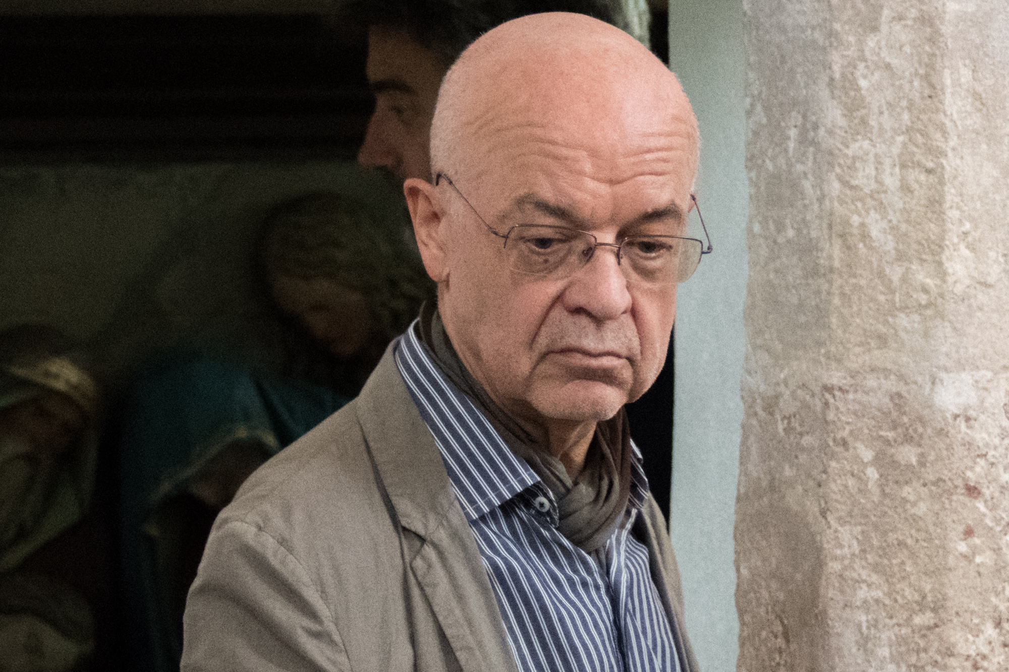 Landgänge 2019 in St. Peter bei Freistadt